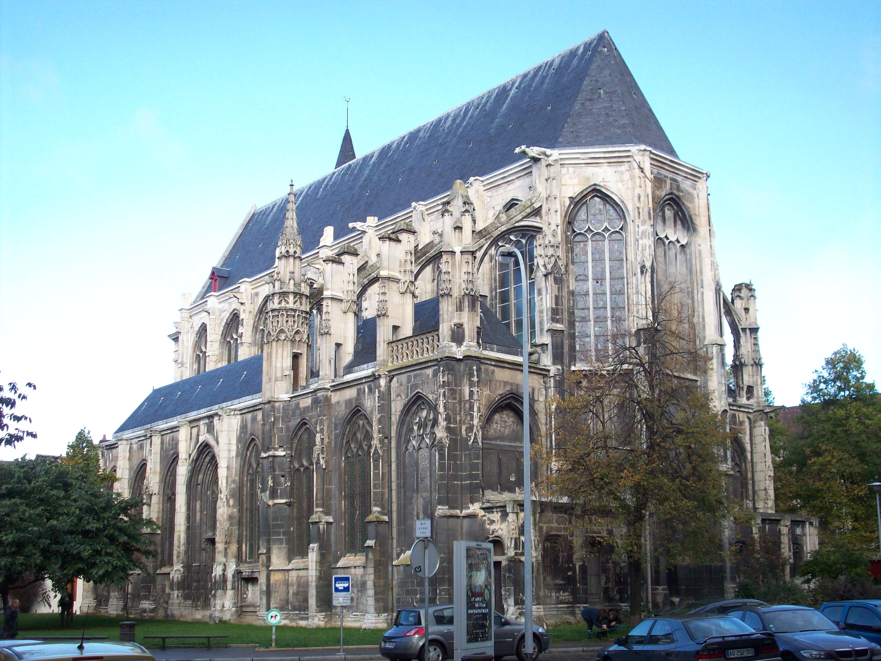 Ancienne église Saint-Eloi, aujourd'hui temple Saint-Eloi, près de la place du Vieux-Marché, à Rouen.